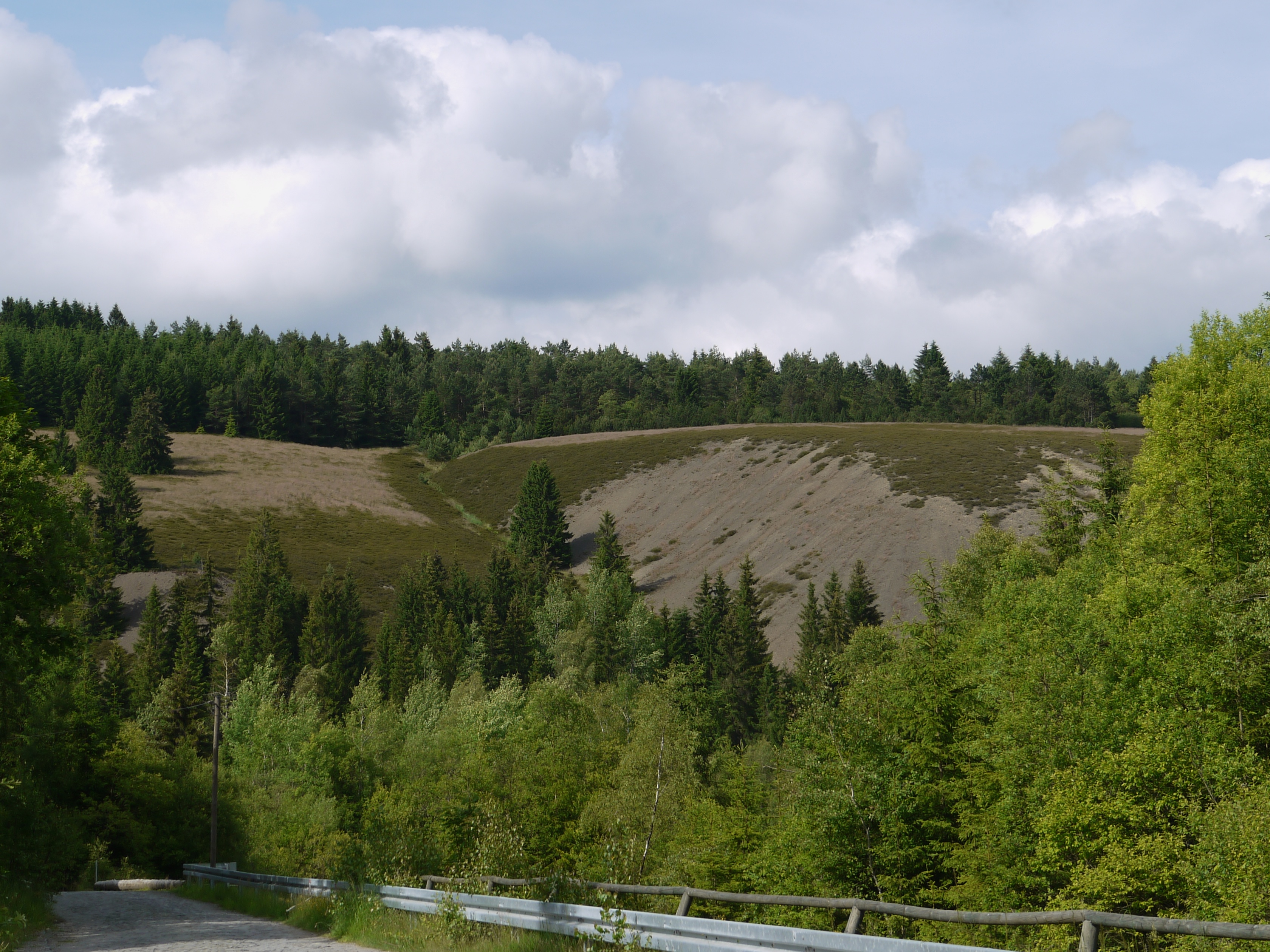 Halden in der Nähe der alten Bleihütte Clausthal / Frankenscharrnhütte (Aufnahme 2014)